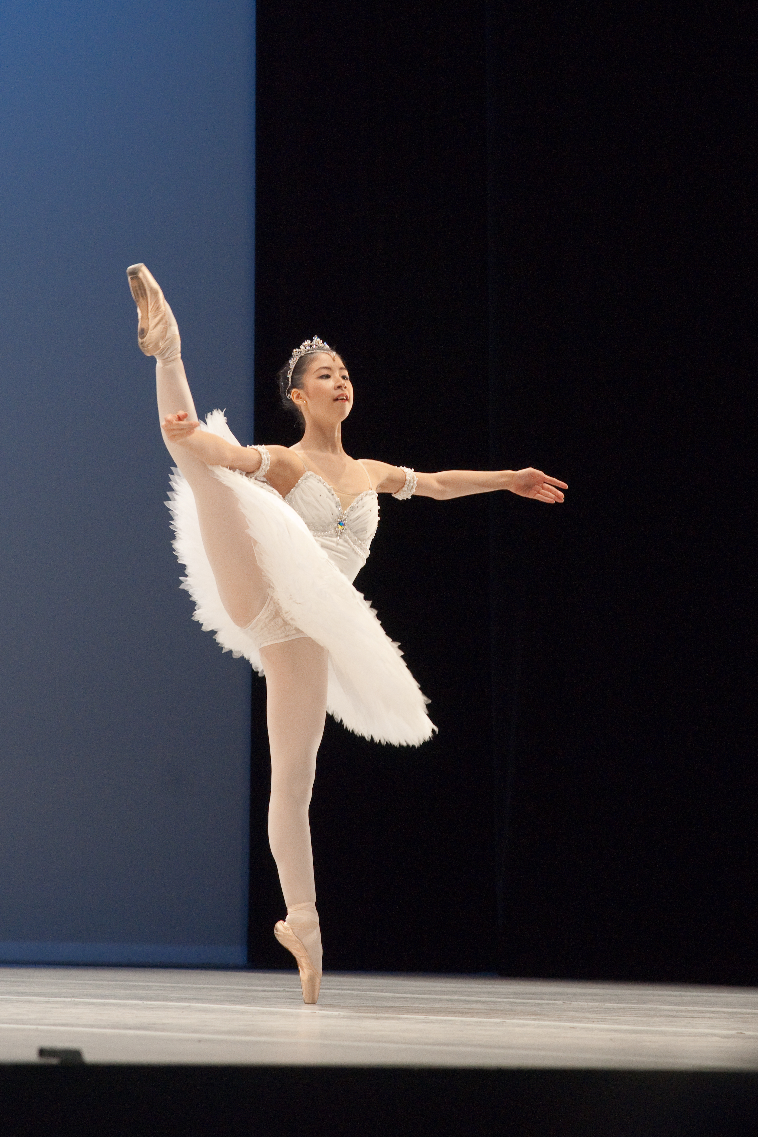 Variation extraite de La Bayadère au Prix de Lausanne 2010.